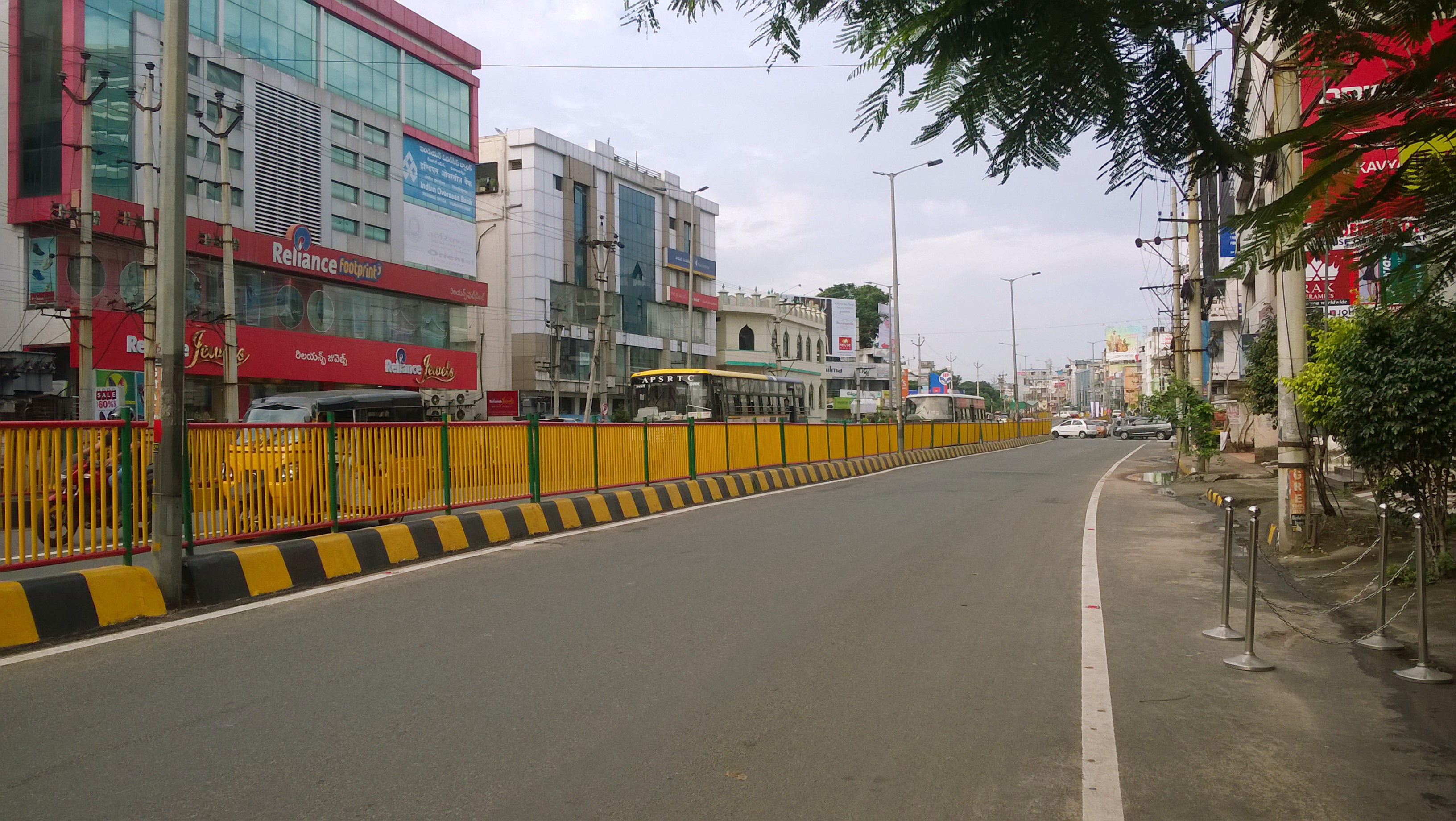 BRTS in Visakhapatnam